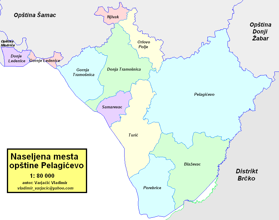 Opština Pelagićevo